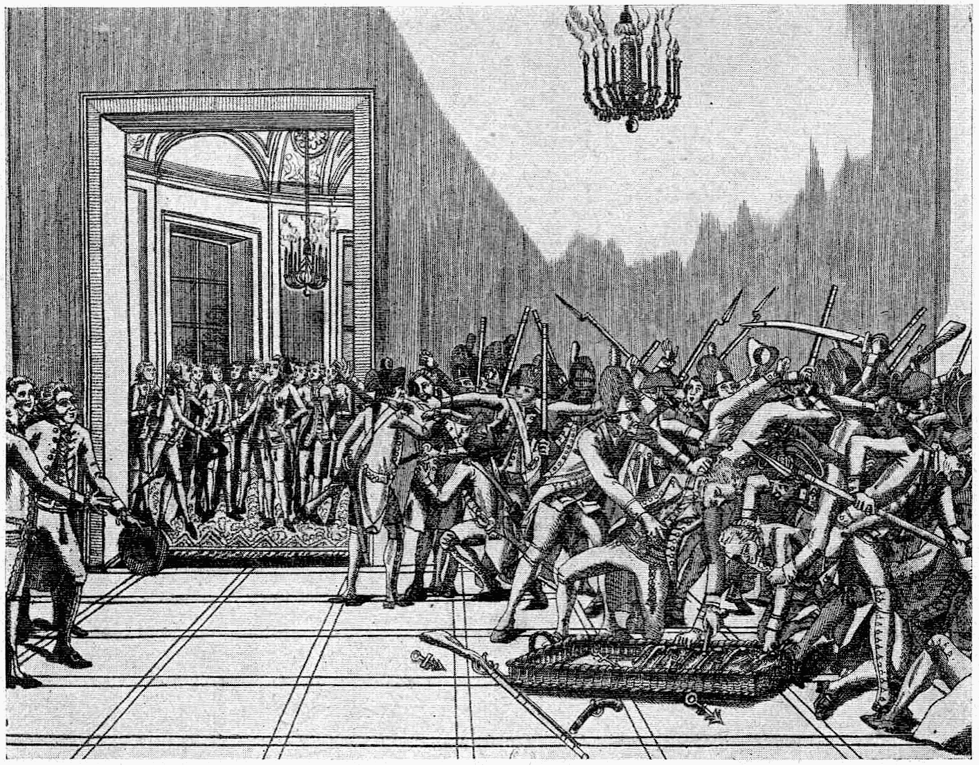 les chevaliers du poignard désarmés en présence de Louis XVI (Février 1791).